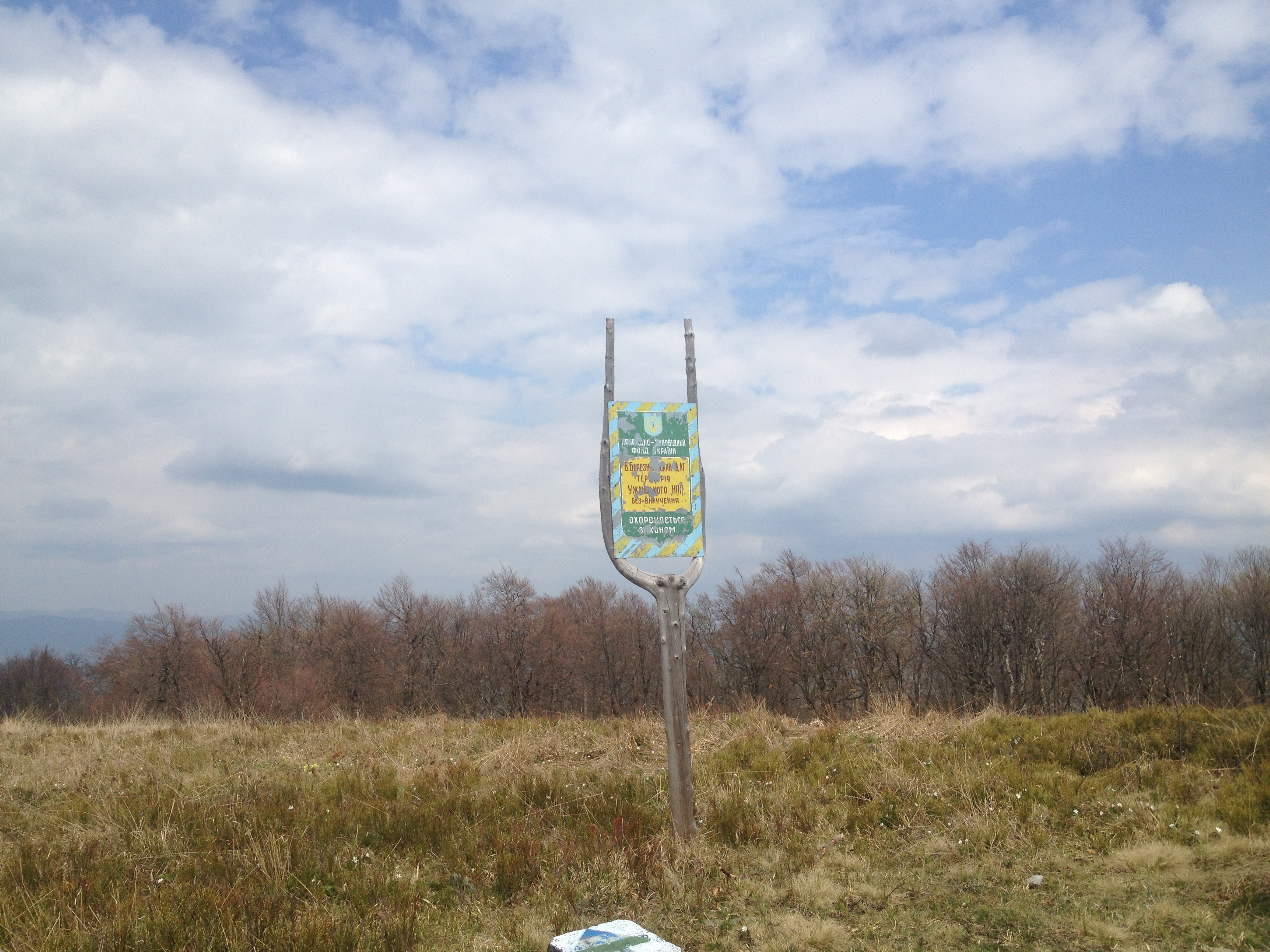 «Гора Яворник», Великоберезнянський р-н, ДП «В.Березнянське ЛГ», Костринське л-во, квартал 16, виділ 11, 12, 15, 17, 25, 26, 29, 31, 33